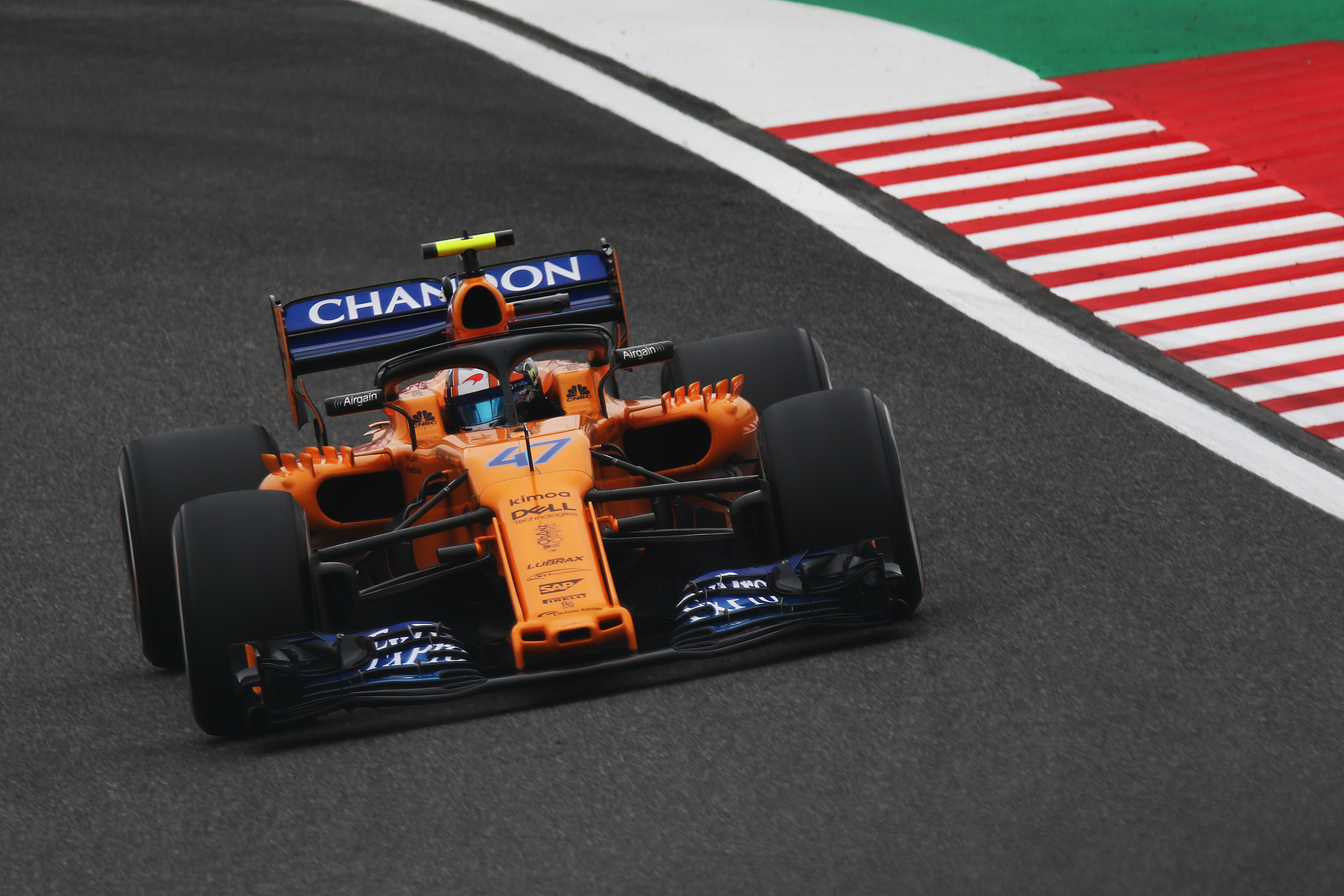 2018 Japanese Grand Prix.